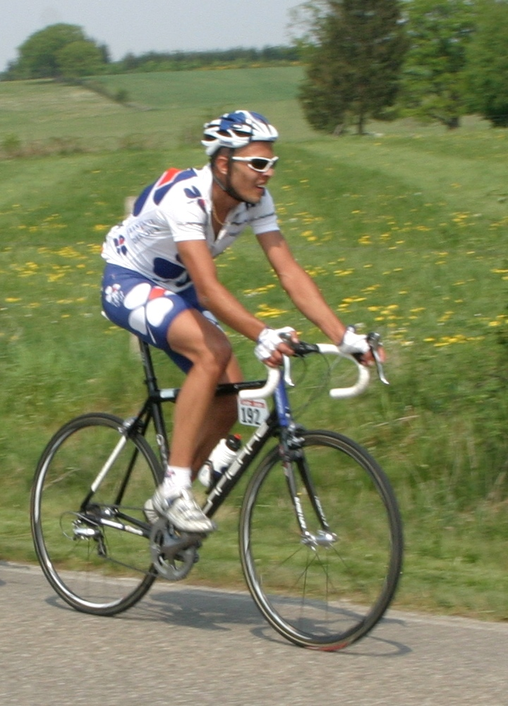 Rémy Di Gregorio au Liège-Bastogne-Liège 2007